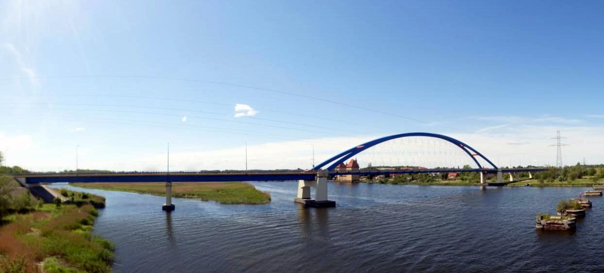 Most obwodowy w Wolinie w ciągu drogi krajowej A3 (ekspresowej S3) nad cieśniną Dziwna.